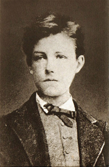 Arthur Rimbaud (1854-1891) en 1872. Photographie conservée à la Bnf.